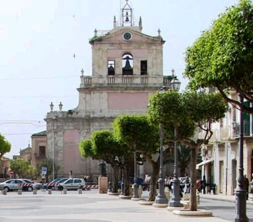 La Chiesa Madre San Giovanni Battista, vista dalla Piazza XX Settembre.